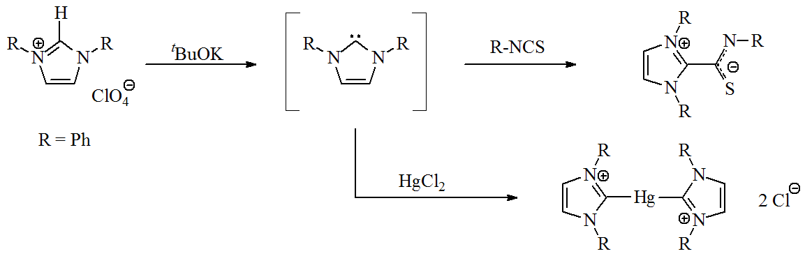 nzlick carbene